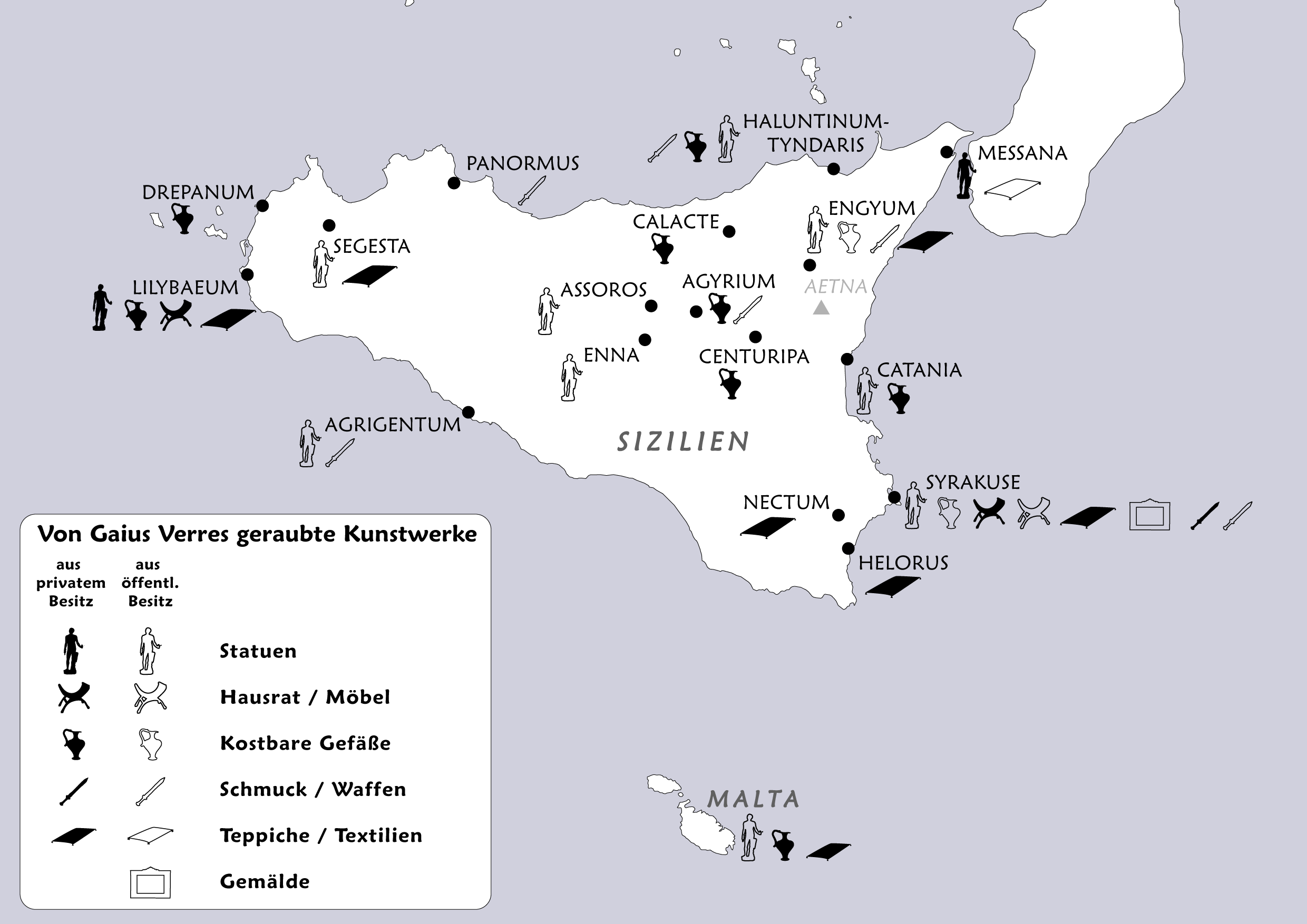 Karte zu den "Raubzügen" von Gaius Verres